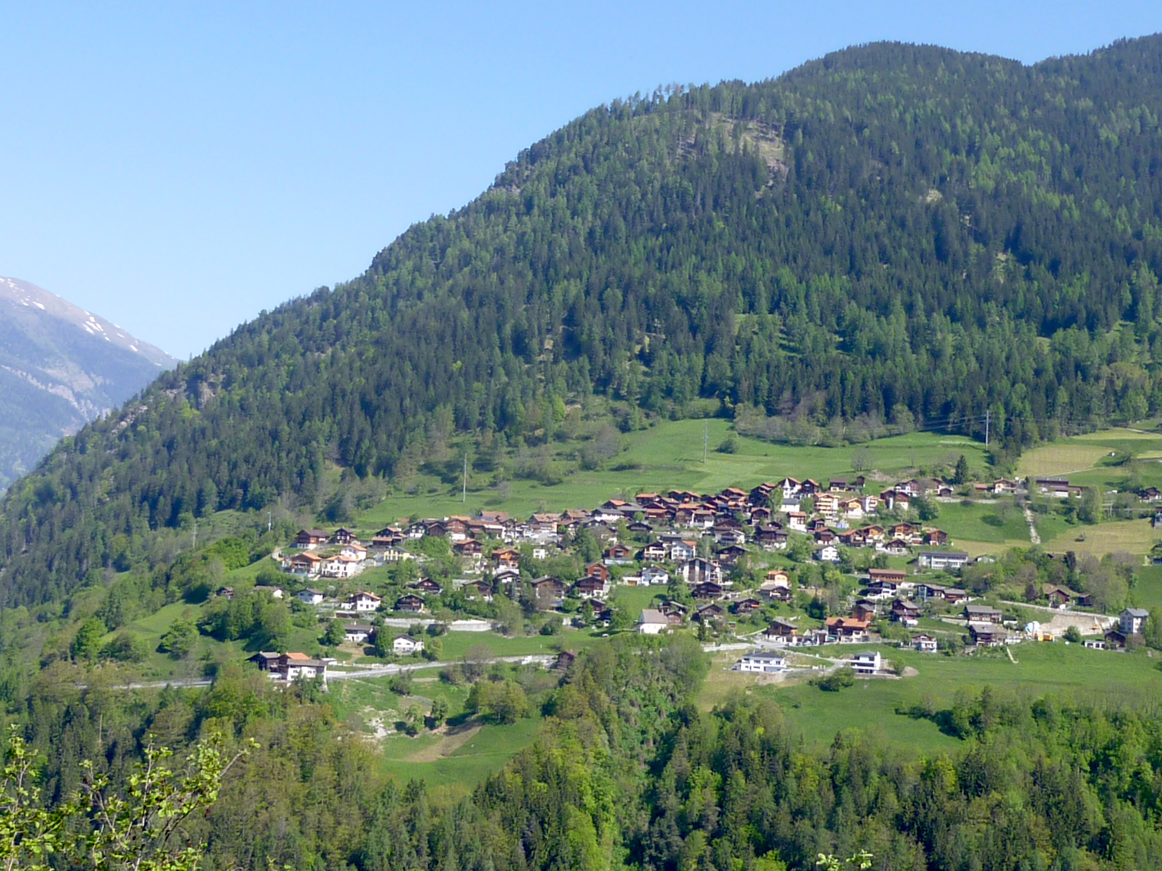 Maladers